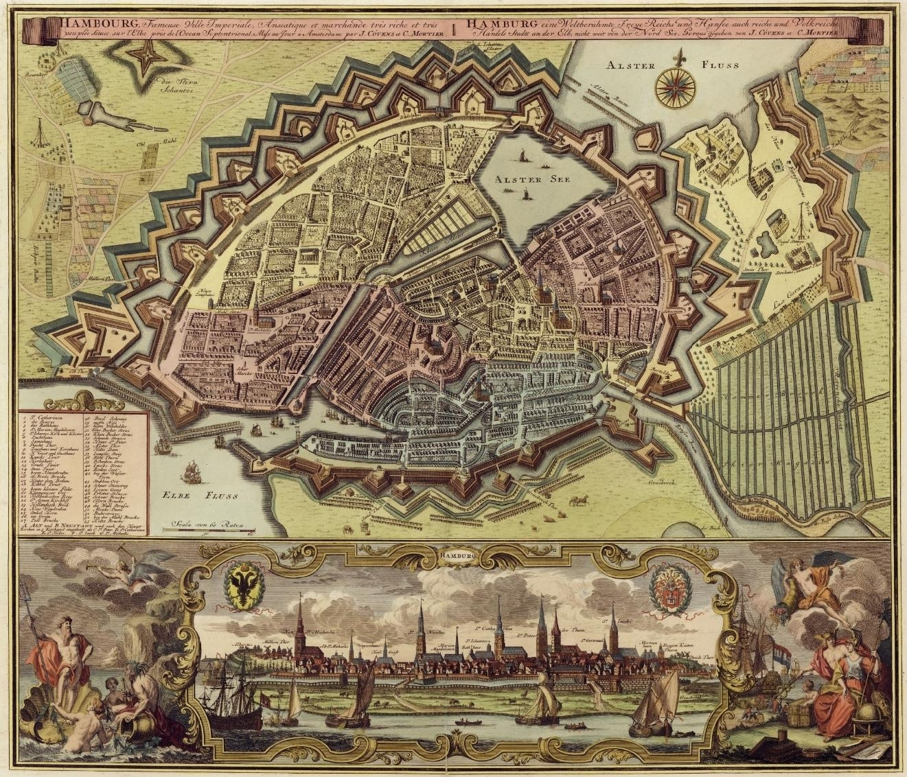 title=Hambourg Fameuse Ville Imperiale ...